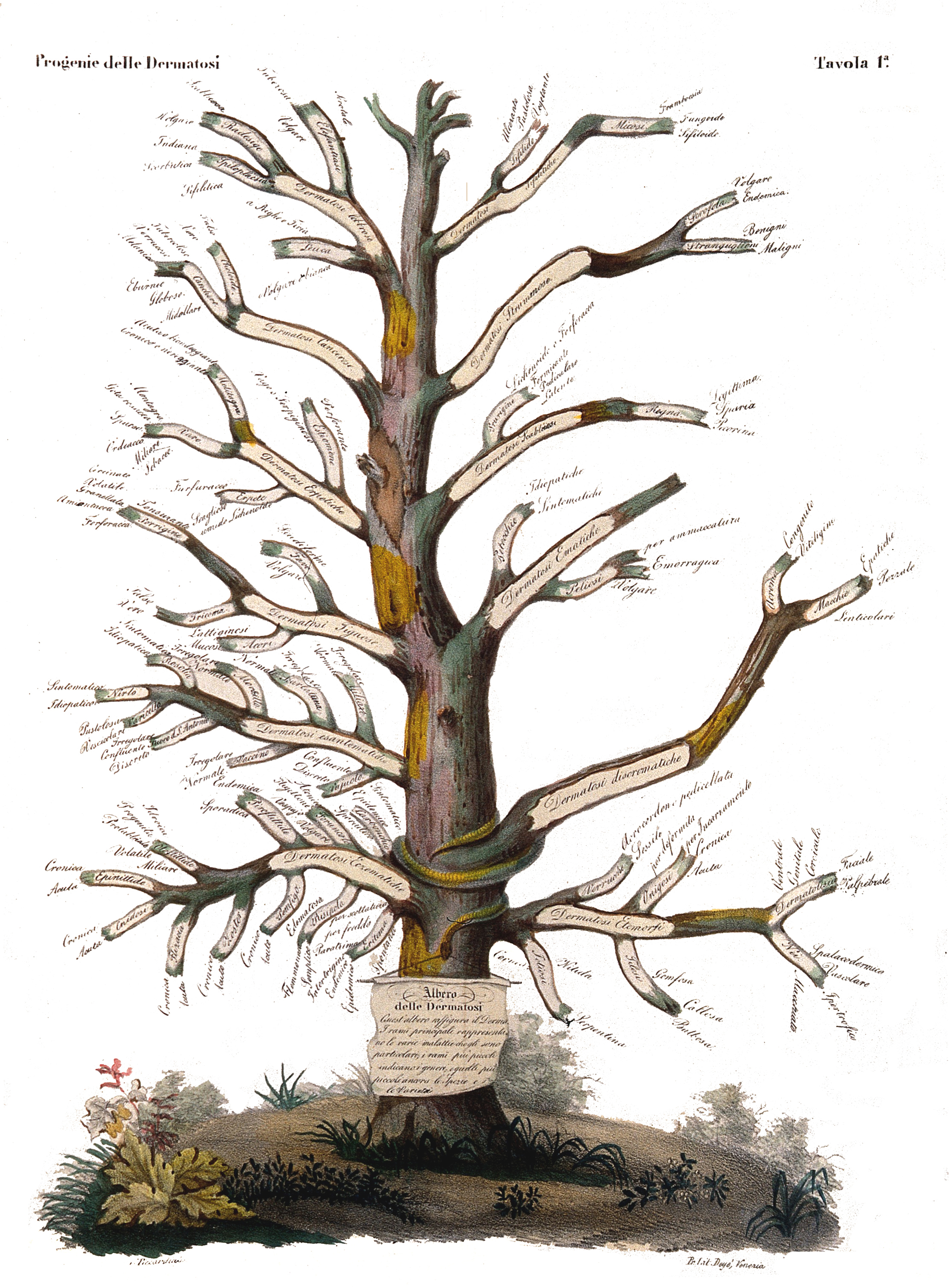 Klassifikation der Dermatosen nach Alibert